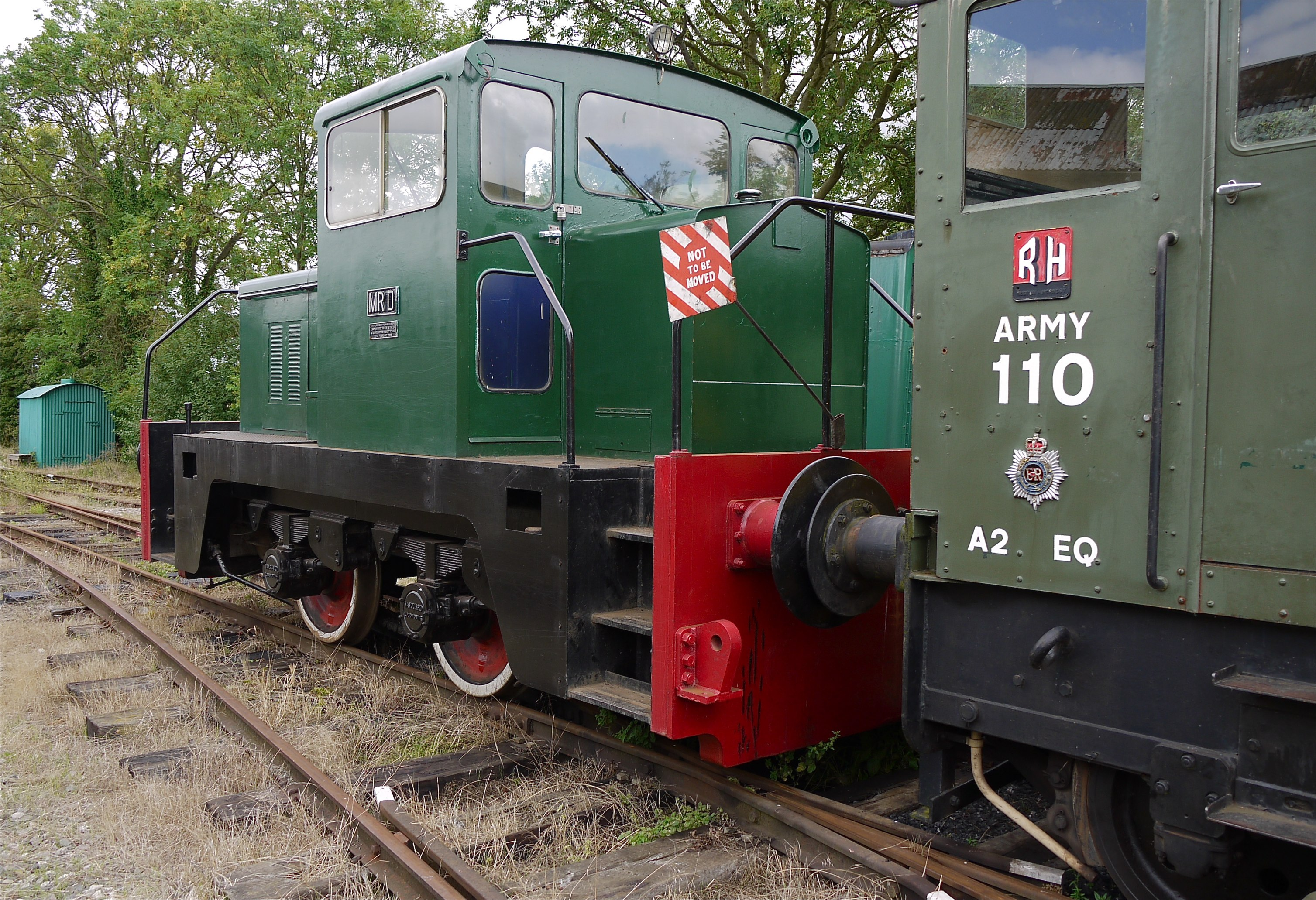 Panasonic G1 14-45 Lens